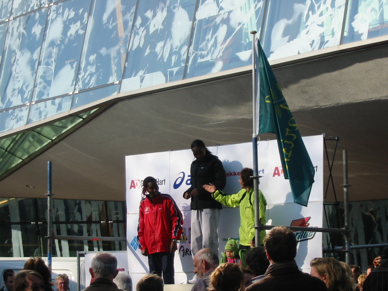 Twintig van Alphen Winnaars dames 2007